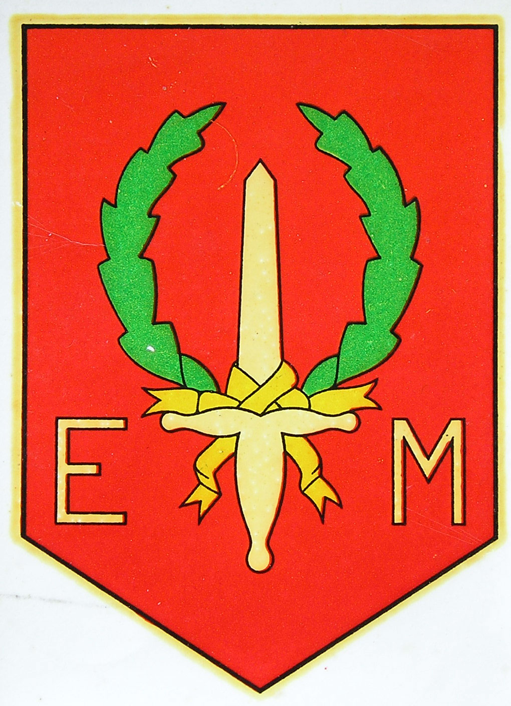 Embleem van de Eerste Divisie "7 December"